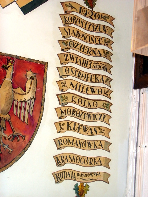 Sufit w sali 2 pułku ułanów grochowskich Instytutu im. Sikorskiego w Londynie